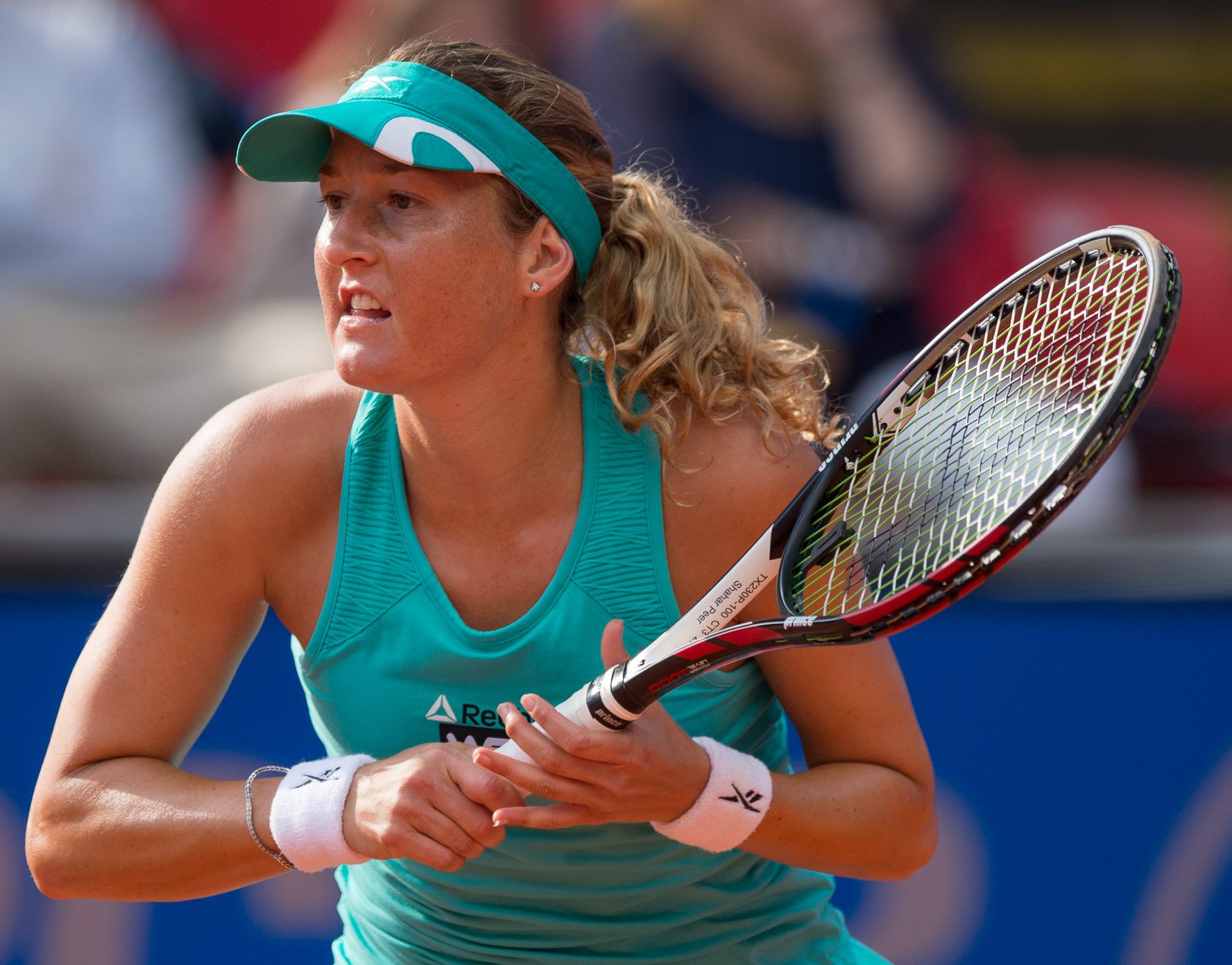 Damentennis,Nürnberger Versicherungscup 2014,Shahar Peer,Tennis,WTA,שחר פאר